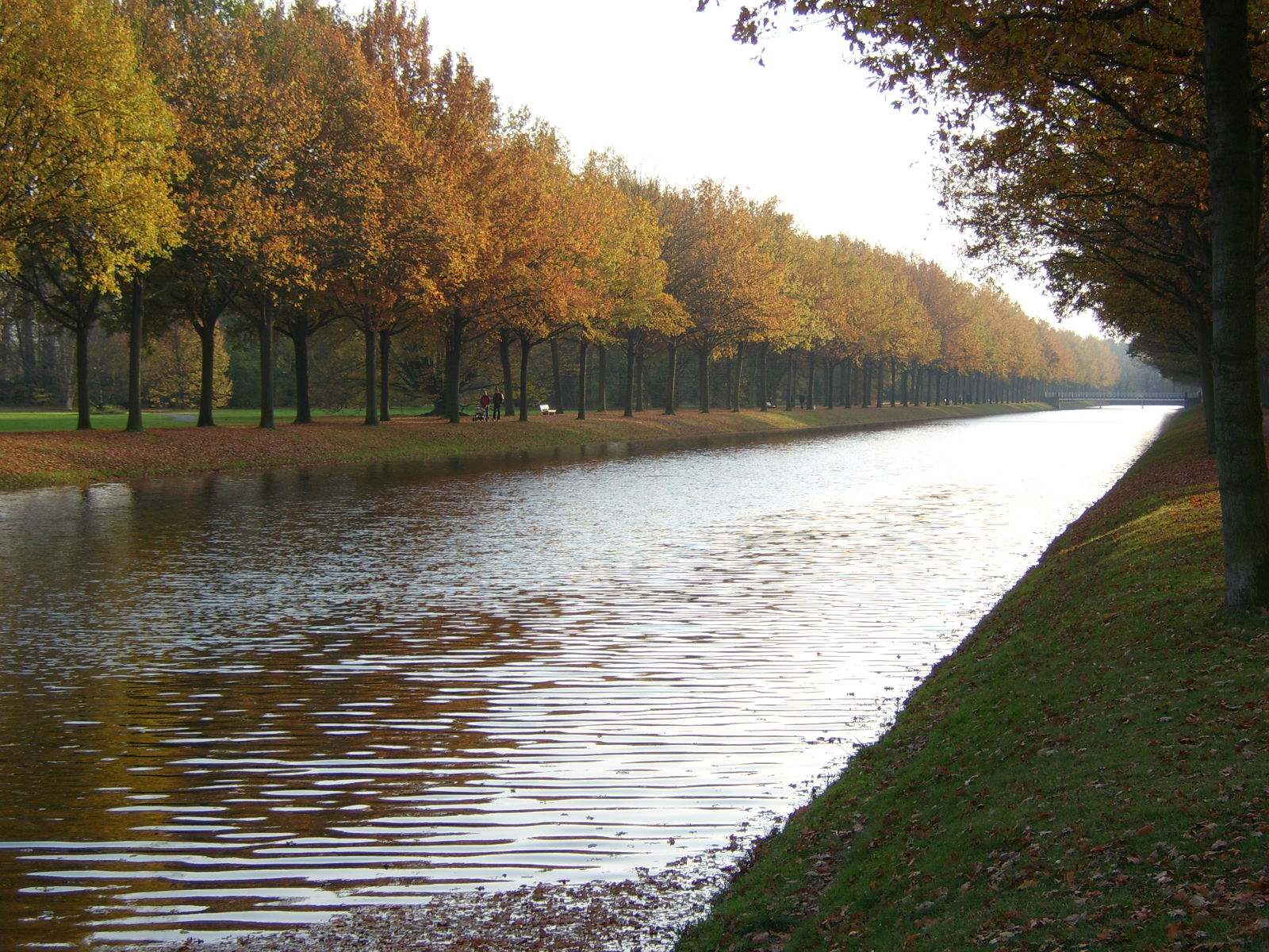 Küchengraben in der Karlsaue (Kassel) selbst photographiert von Carroy, 9.11.2005 14:03, 11. Nov 2005 Carroy 1600 x 1200 (1313894 Byte) (Küchengraben in der Karlsaue (Kassel) , selbst photographiert von Carroy , 9.11.2005)